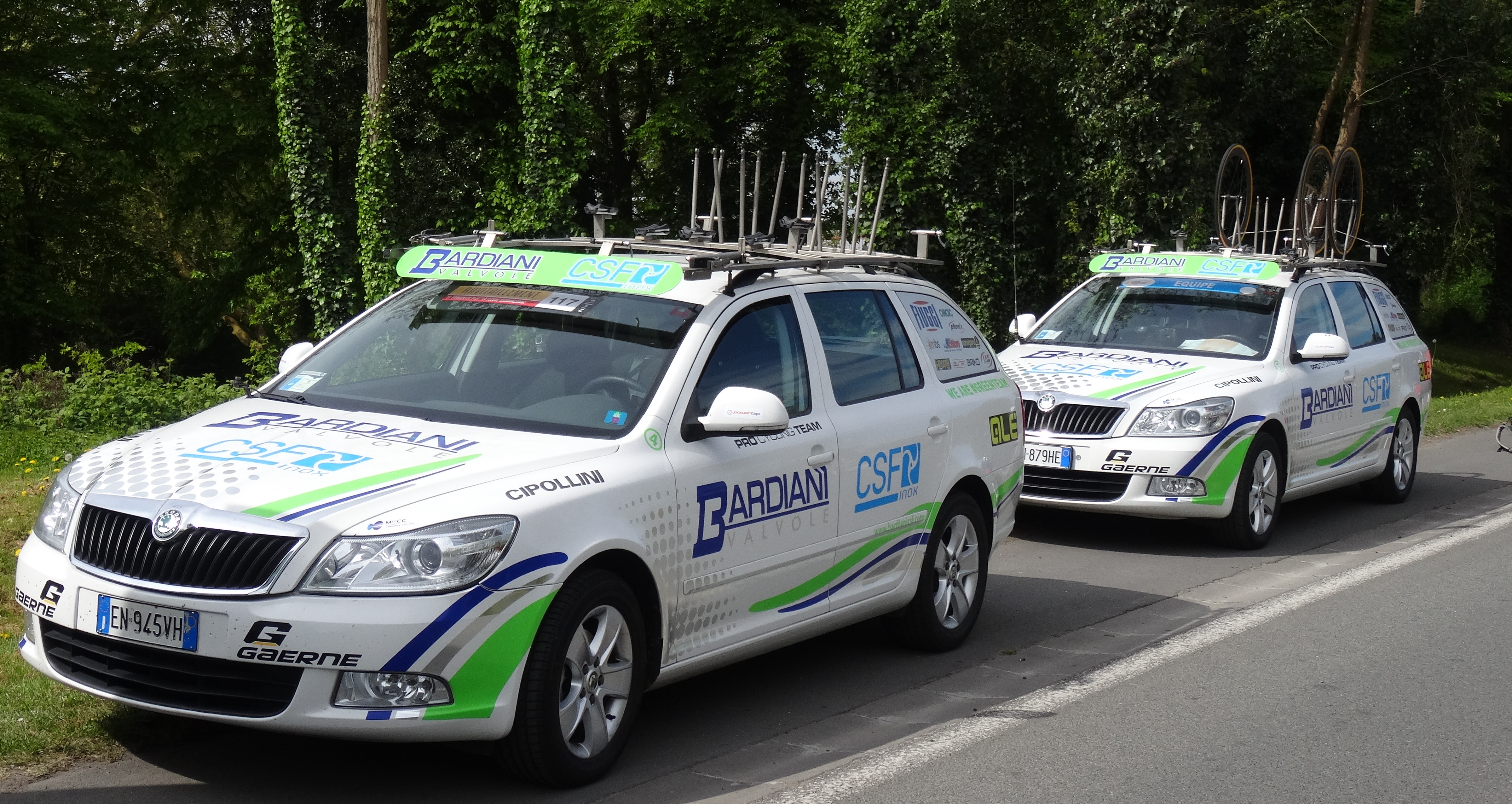 Reportage réalisé le jeudi 17 avril à l'occasion du départ et de l'arrivée du Grand Prix de Denain 2014 à Denain, Nord, Nord-Pas-de-Calais, France.